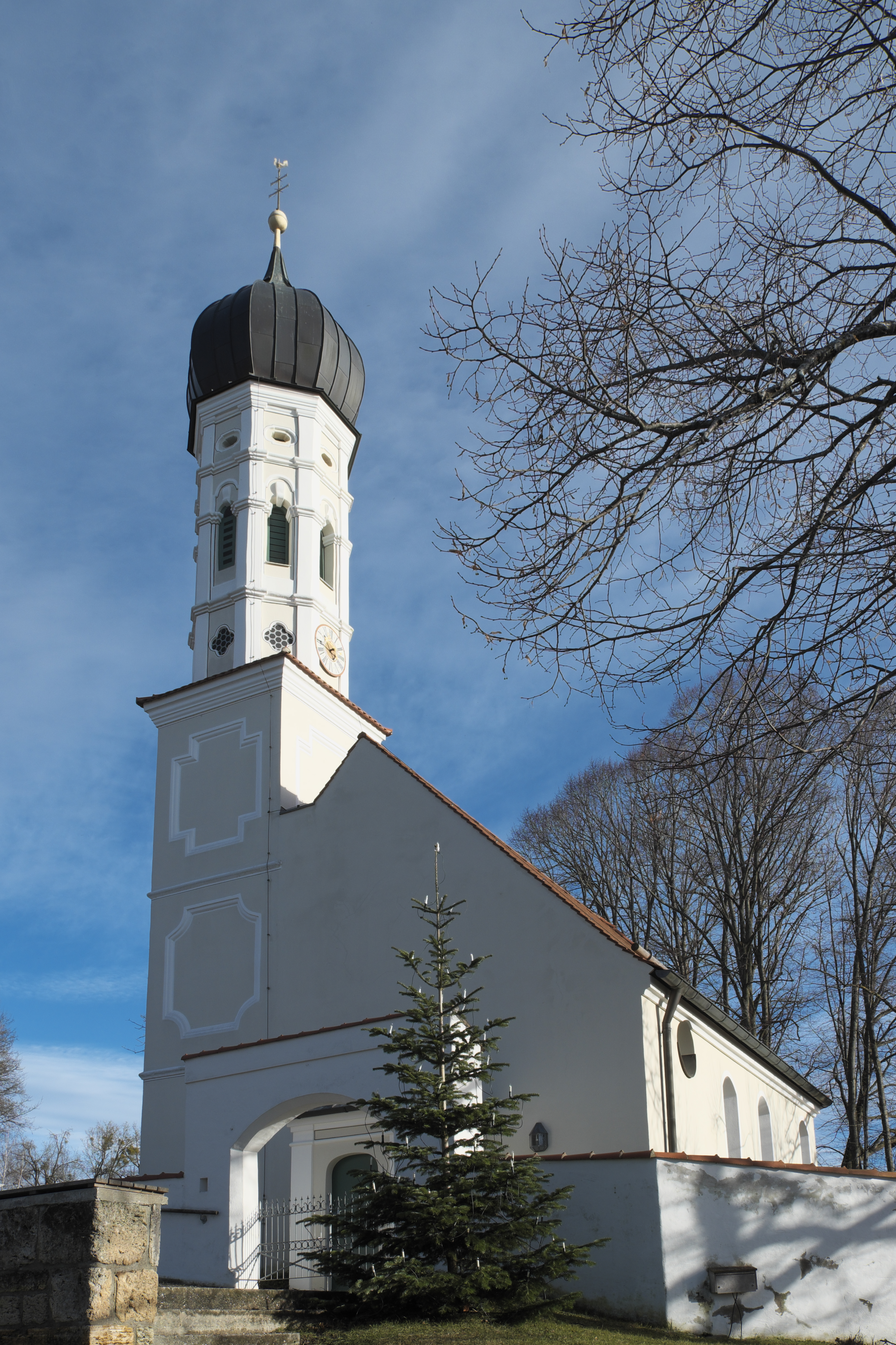 St. Pankratius in Mitterfischen (Pähl) im Landkreis Weilheim-Schongau (Bayern/Deutschland), Westfassade und Turm